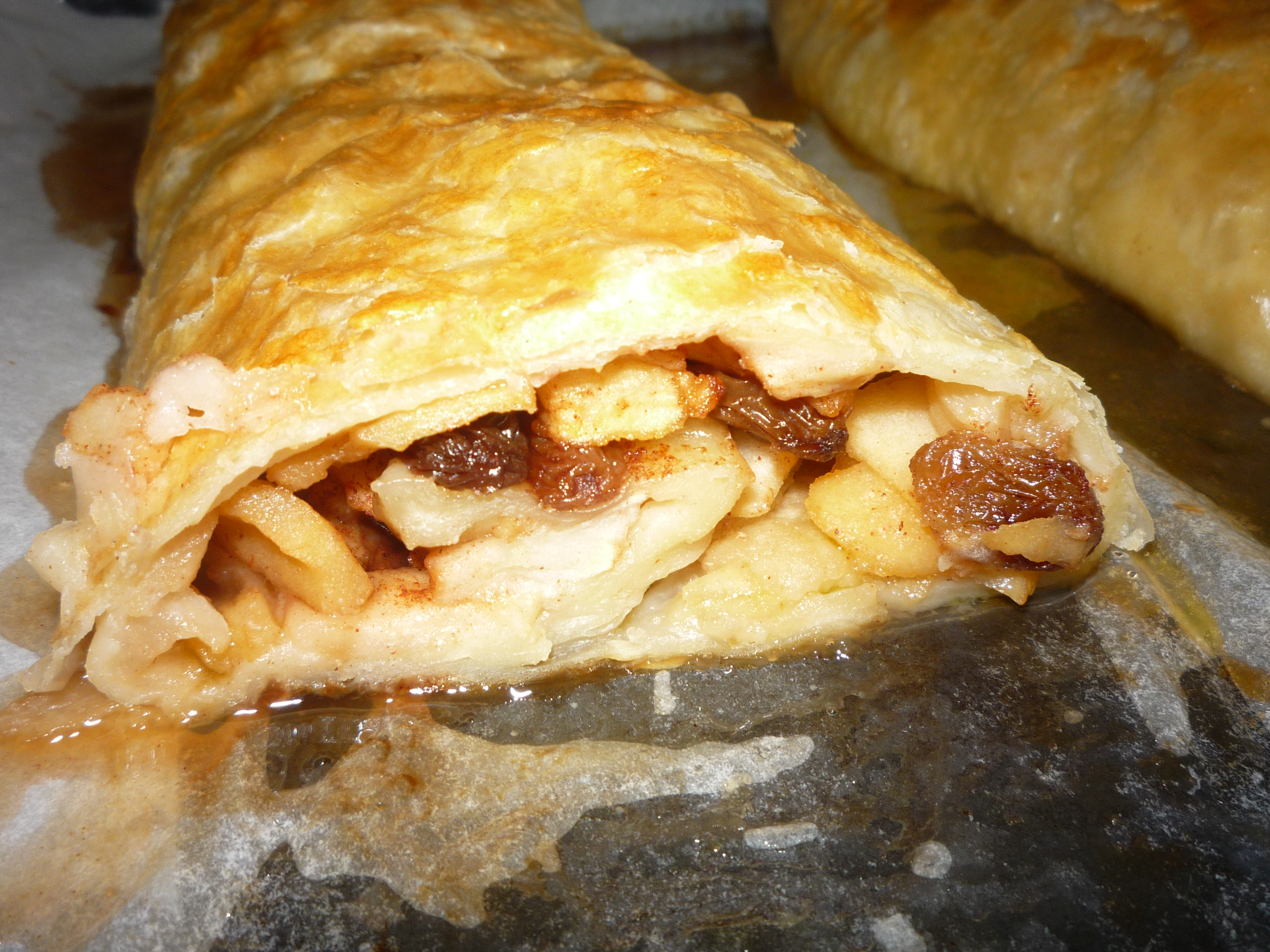 Autor fotografie Jiří Zelenka. Štrúd (závin) z listového těsta. Czech Republic.